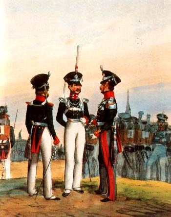 kurhessische Linieninfanterie um 1835